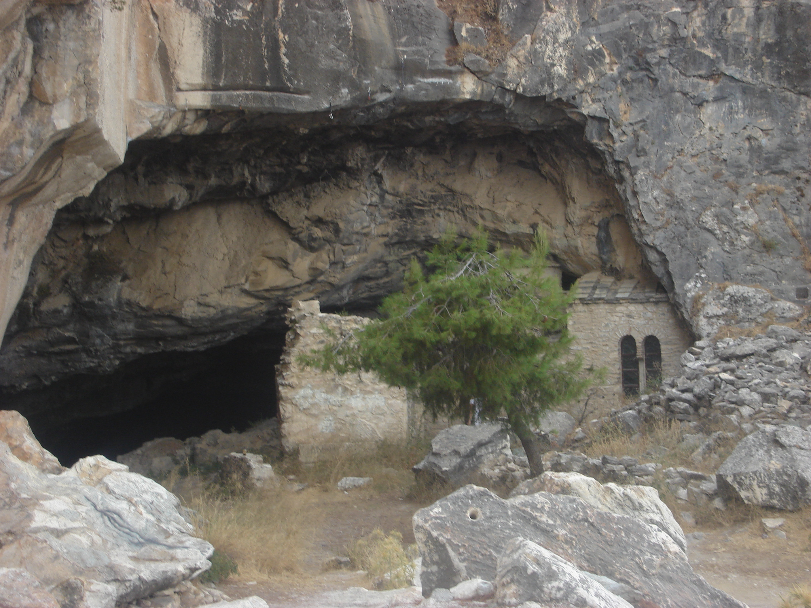 Σπήλαιο Νταβέλη«Σπήλαιο Νταβέλη»